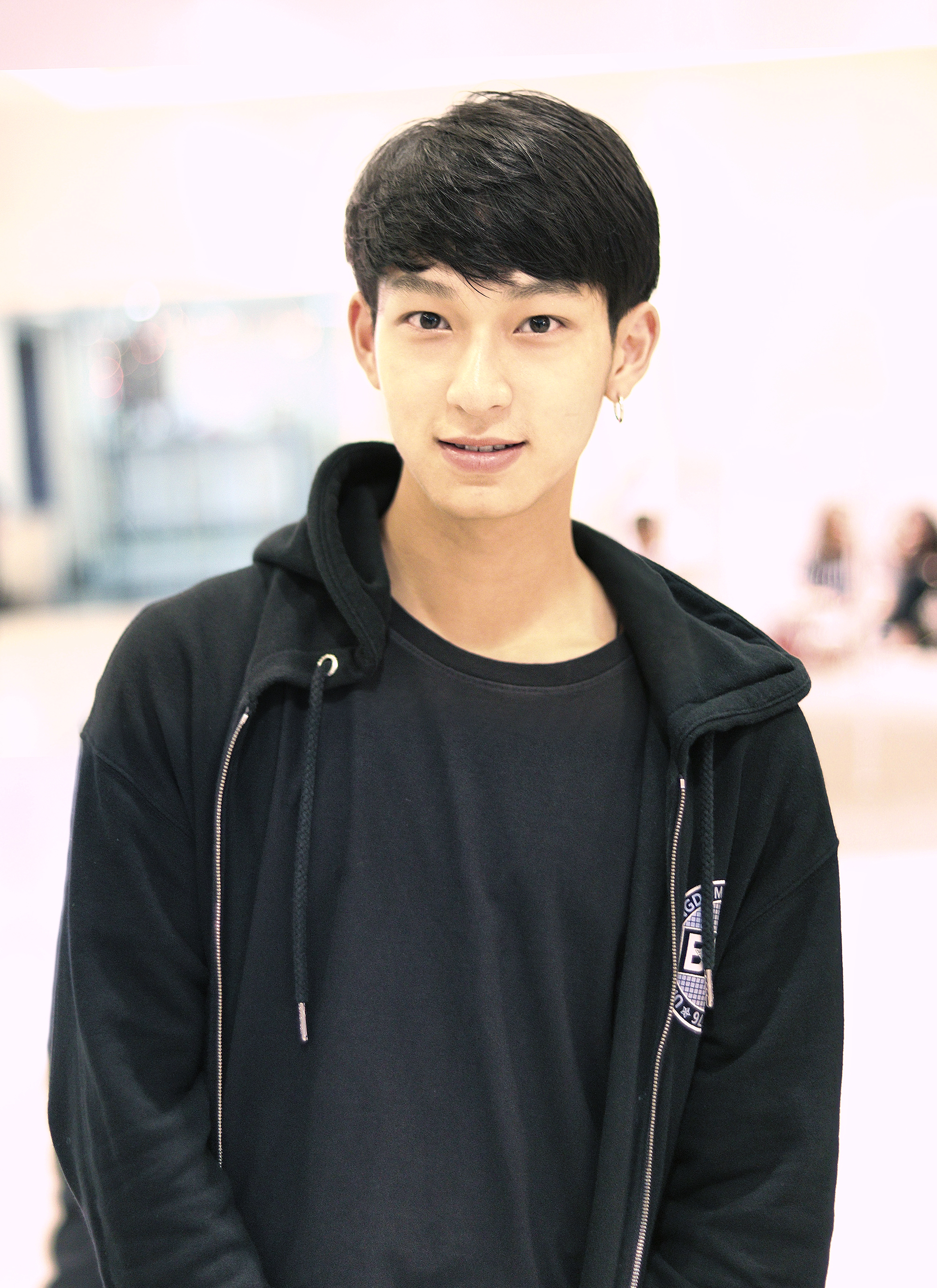 Chimon in GMM Grammy place © Cancanisstory This photo is my copyright.